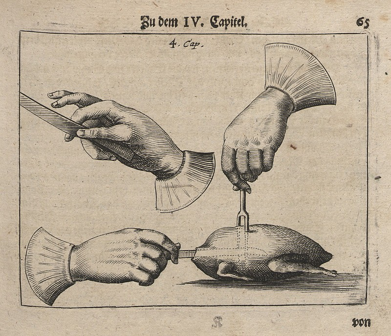 Original image description from the Deutsche Fotothek Gastronomie & Esskultur & Tischsitte & Speise & Besteck & Zubereitung